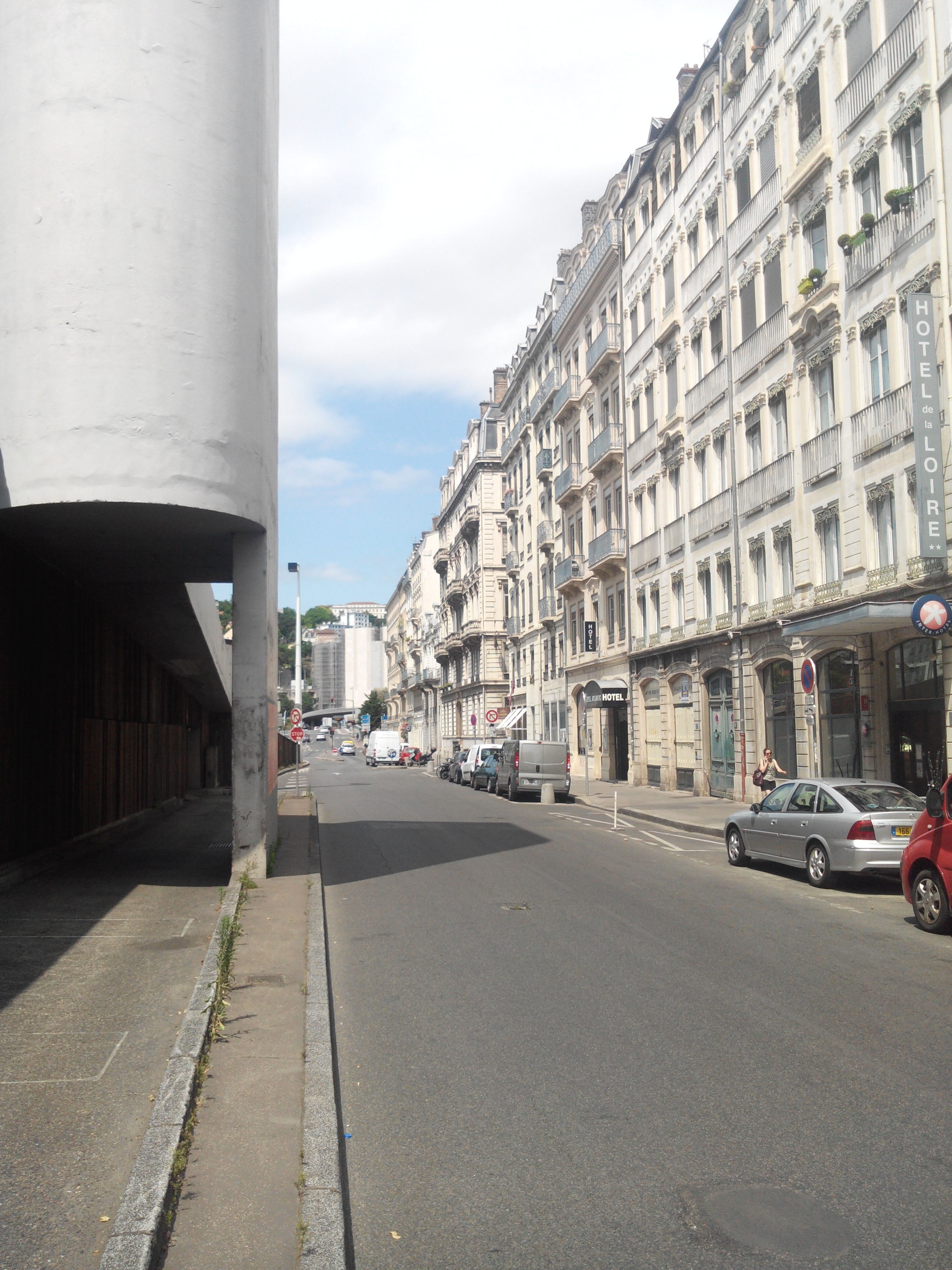 Cours de Verdun-Gensoul, dans le 2e arrondissement de Lyon.